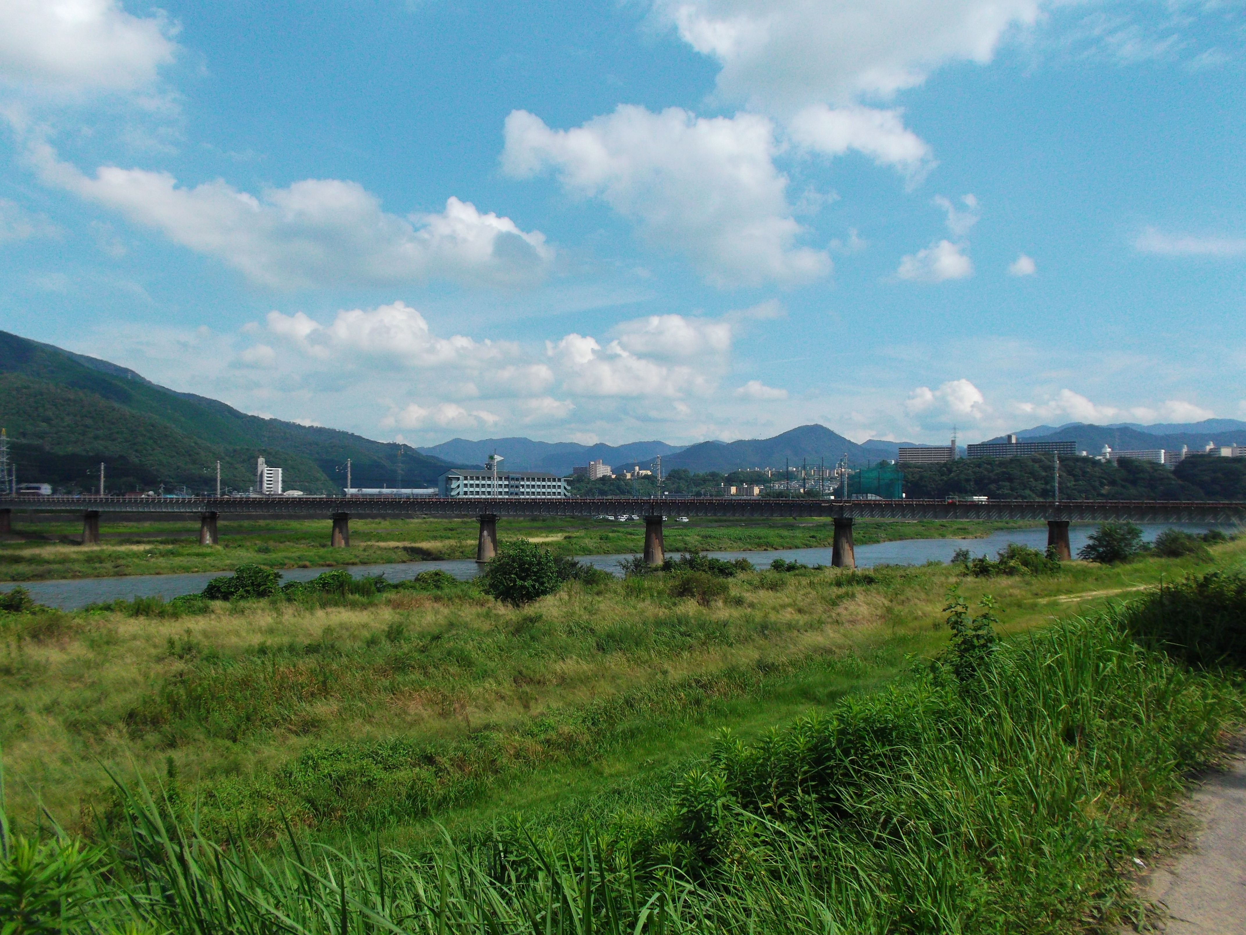 JR太田川橋